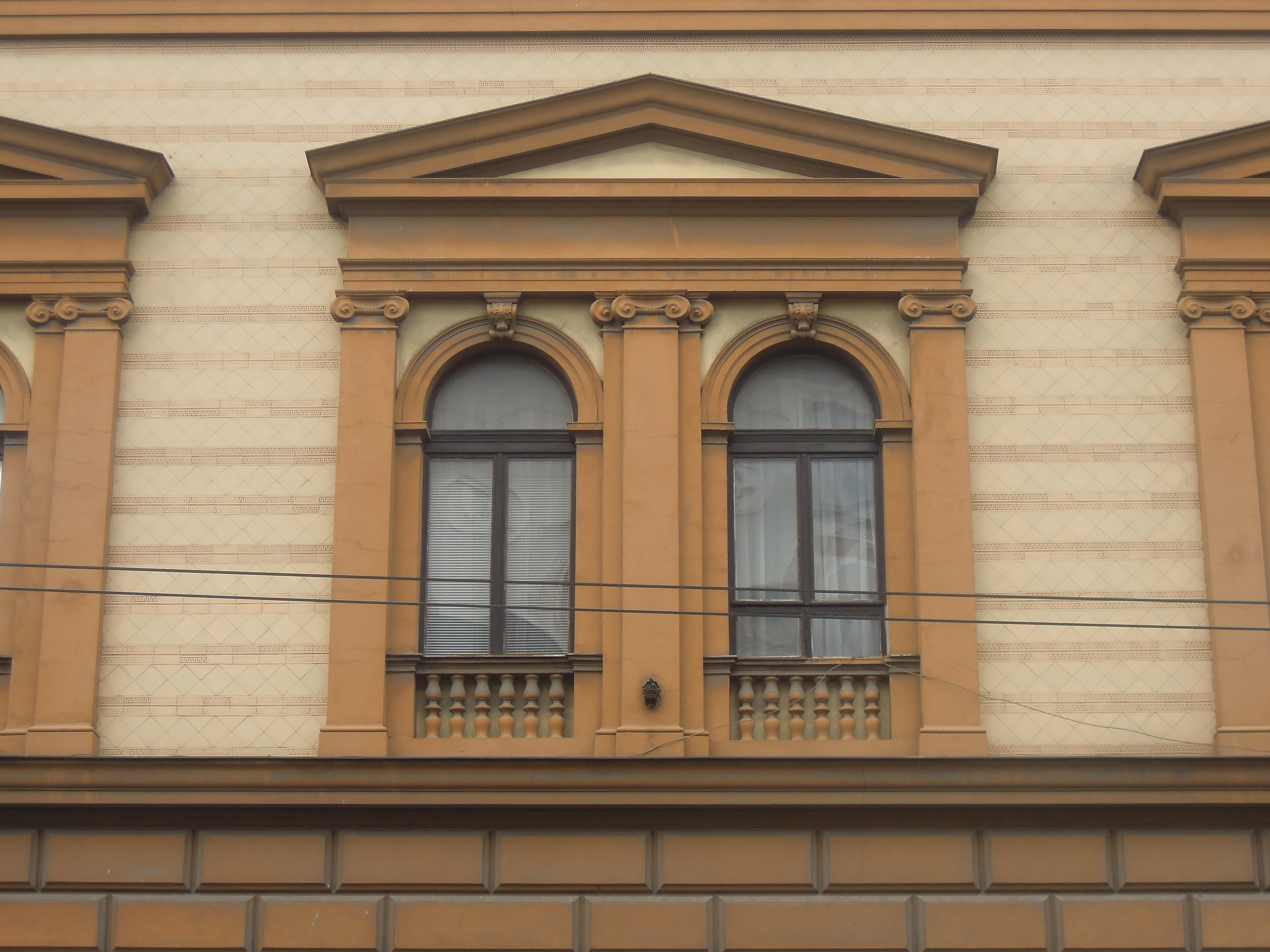 Zgrada Ministarstva pravde u Beogradu.